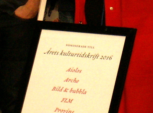 Provins valdes till Årets kulturtidskrift 2016.